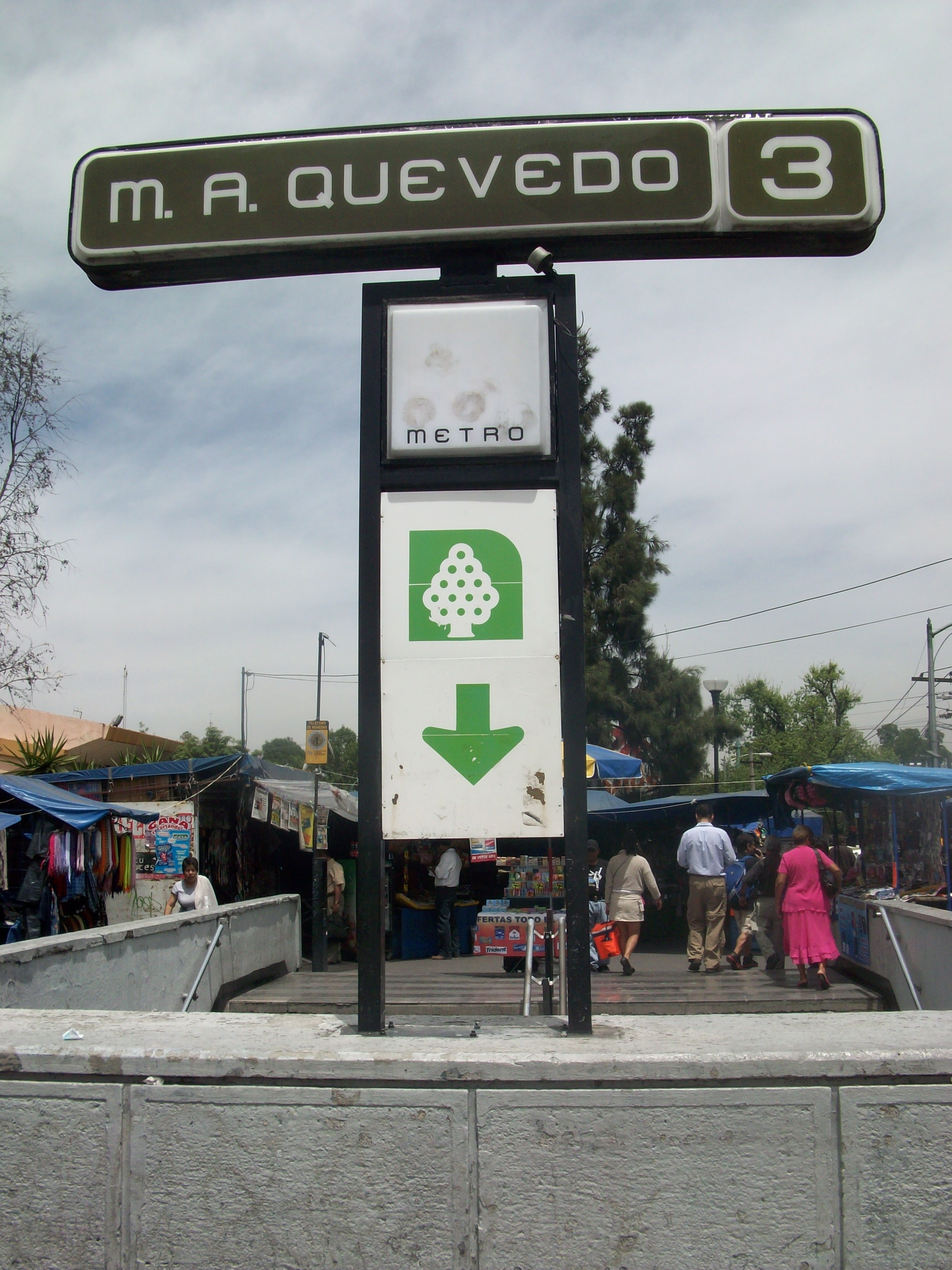 Letrero estacion Miguel Angel de Quevedo